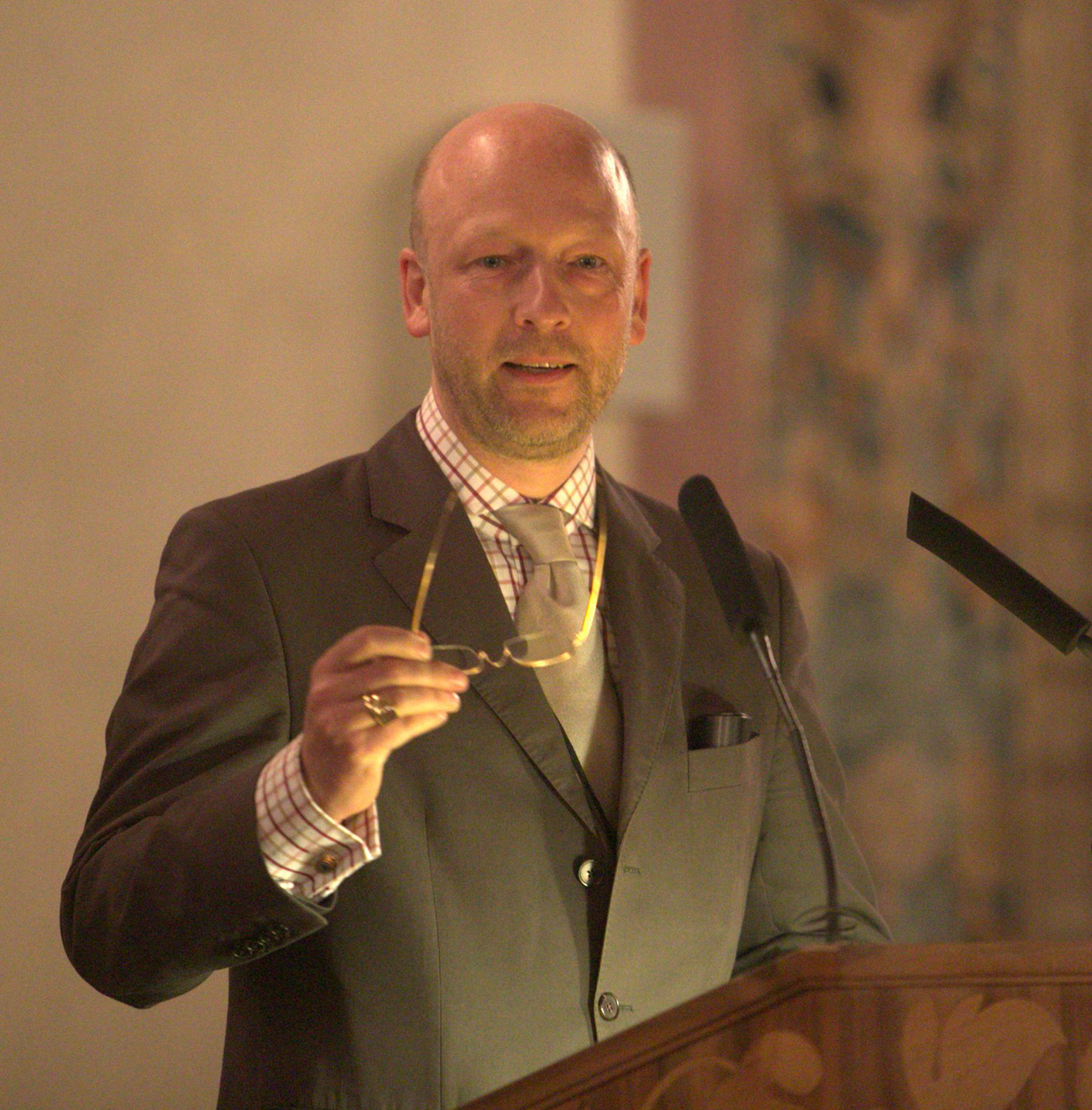 Johann Hinrich Claussen, deutscher evangelisch-lutherischer Theologe, Autor, Hauptpastor an St. Nikolai in Hamburg und Propst für die Propstei Alster-West im Kirchenkreis Hamburg-Ost der Evangelisch-Lutherischen Kirche in Norddeutschland. Hier während einer Ansprache auf der Eröffnungsveranstaltung des 28. Evangelischen Kirchenbautags am 9.10.2014 im Kaisersaal der Münchner Residenz.